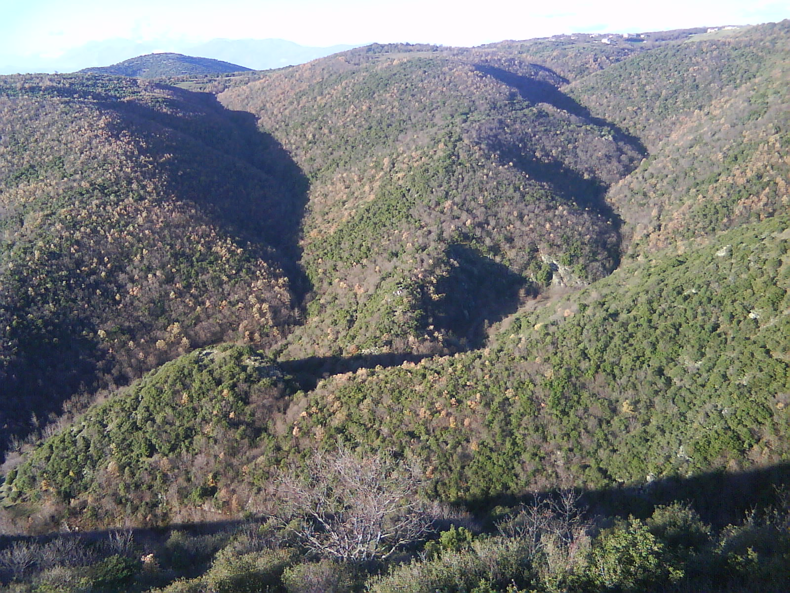 Pogled na selo Memešli od selo Dorlombos